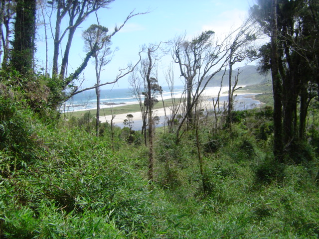 Species Aextoxicon punctatum Autor: Roberto Bahamonde Andrade Fecha: 30 de diciembre, 2003